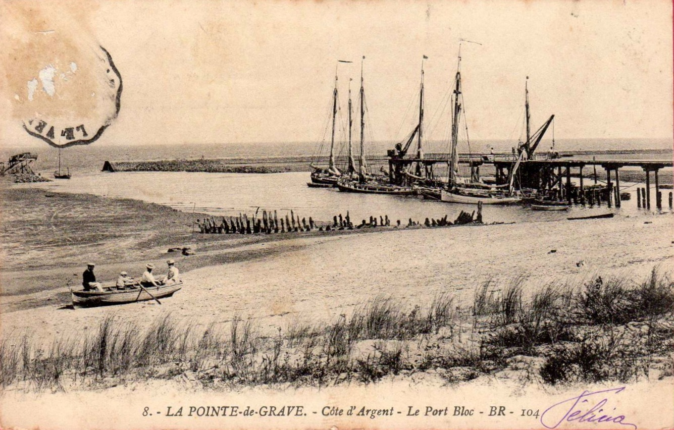 Le Verdon-sur-Mer